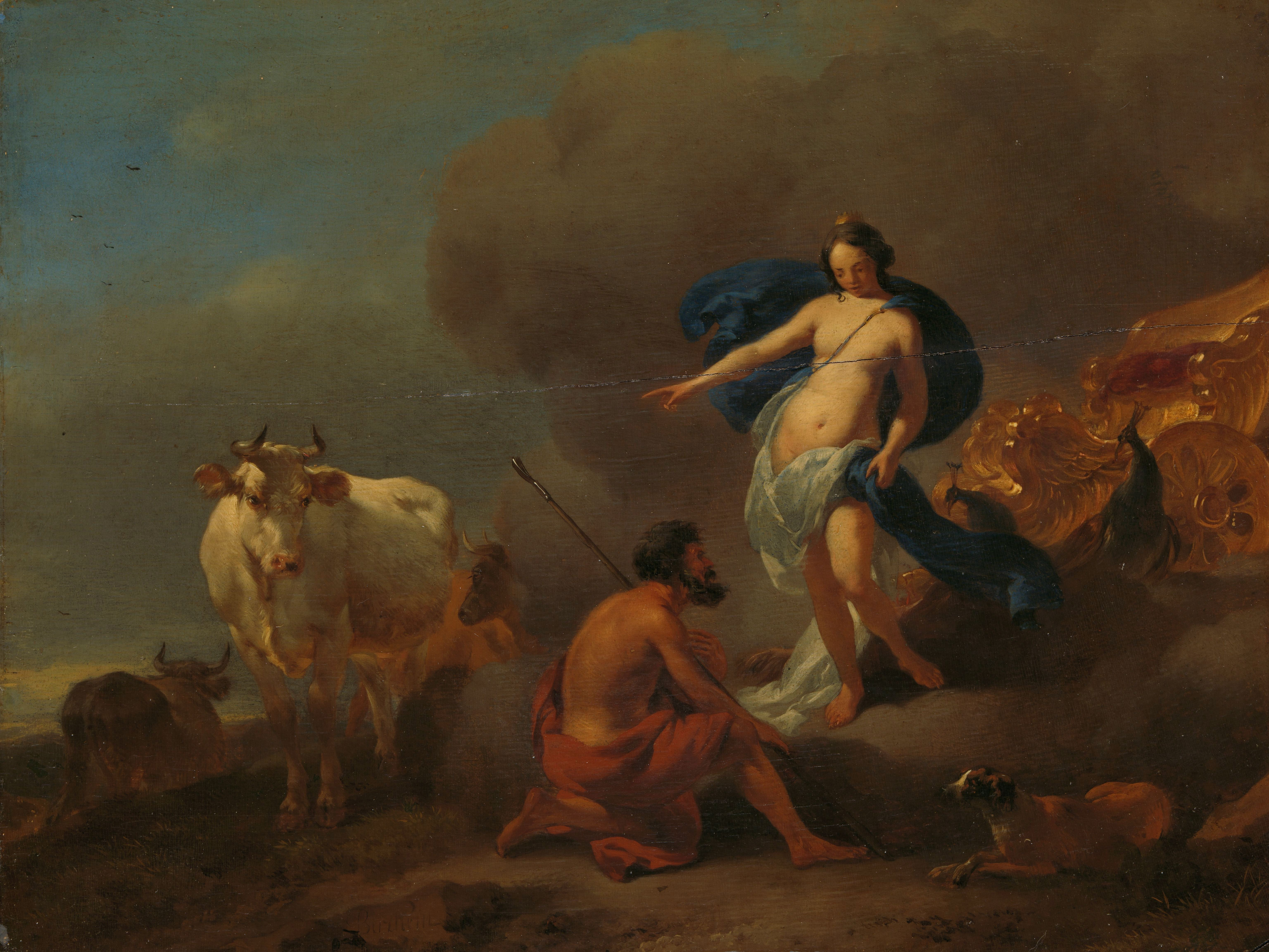 IdentificatieTitel(s): Juno geeft Argus opdracht Io te bewakenObjecttype: schilderij Objectnummer: SK-A-1936Opschriften / Merken: signatuur, linksonder op een steen: ‘Berchem’Omschrijving: Juno geeft de herder Argus opdracht Io te bewaken. Links Io in de gedaante van een koe. Achter Juno haar triomfwagen en twee pauwen.VervaardigingVervaardiger: schilder: Nicolaes Pietersz. BerchemDatering: 1655 - 1683Fysieke kenmerken: olieverf op paneelMateriaal: paneel olieverf Afmetingen: drager: h 24,5 cm. × b 31,5 cm. buitenmaat: d 8,1 cm. (drager incl. SK-L-6256)Verwerving en rechtenCredit line: Aankoop met steun van de Vereniging RembrandtVerwerving: aankoop mar-1901Copyright: Publiek domein